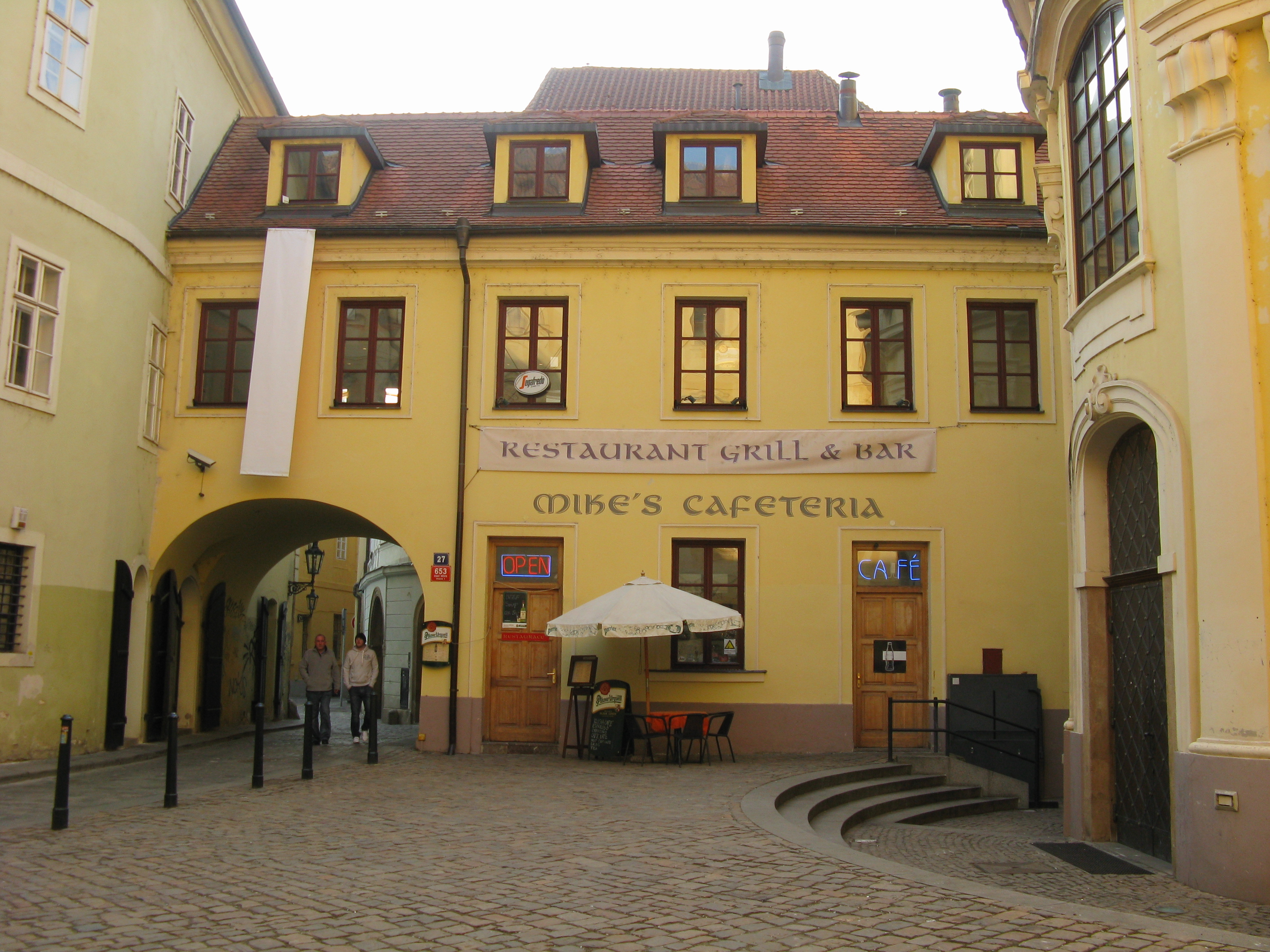 Michalská 653/27, součást komplexu kláštera servitů, prostranství před kostelem svatého Michaela archanděla.